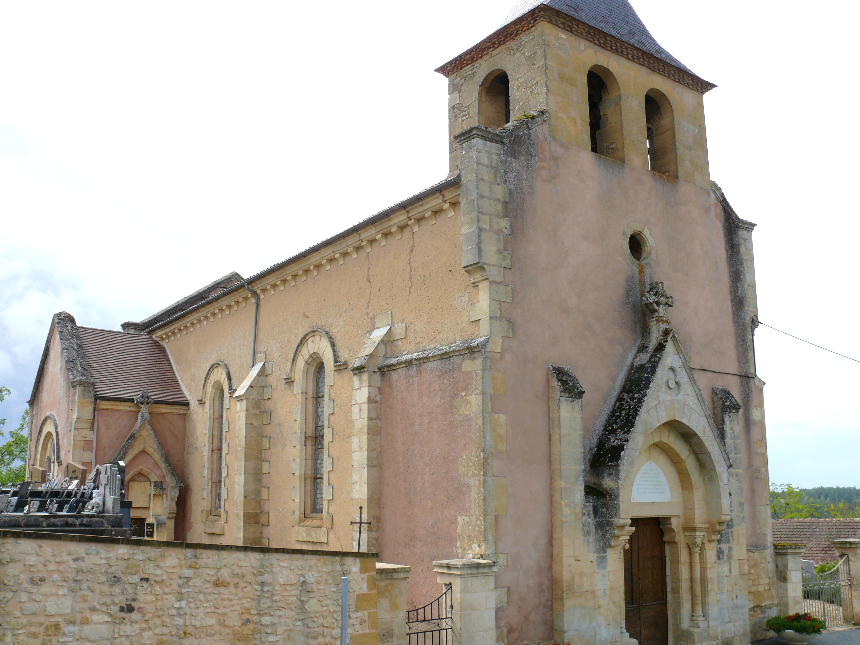 Doissat - Eglise Saint-Hilaire